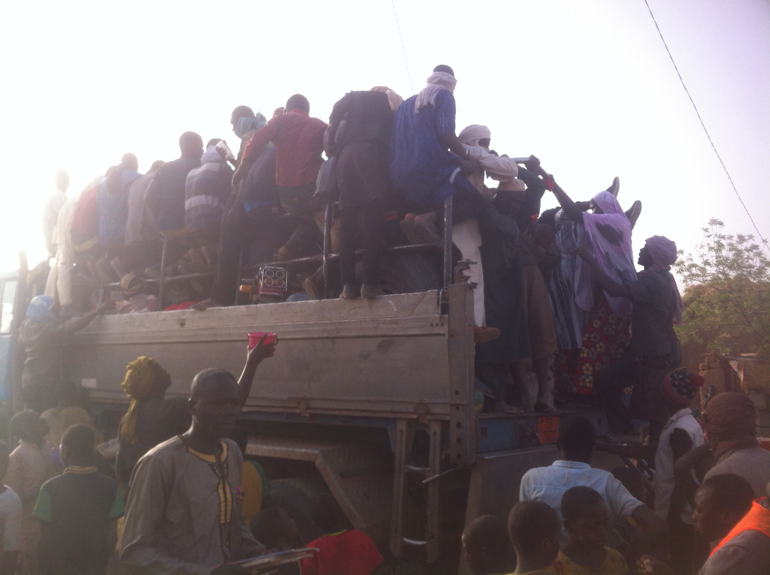 De SANAM (Niger) Destination la Libye puis l'Europe This is an image with the theme "Africa on the Move or Transport" from: Niger